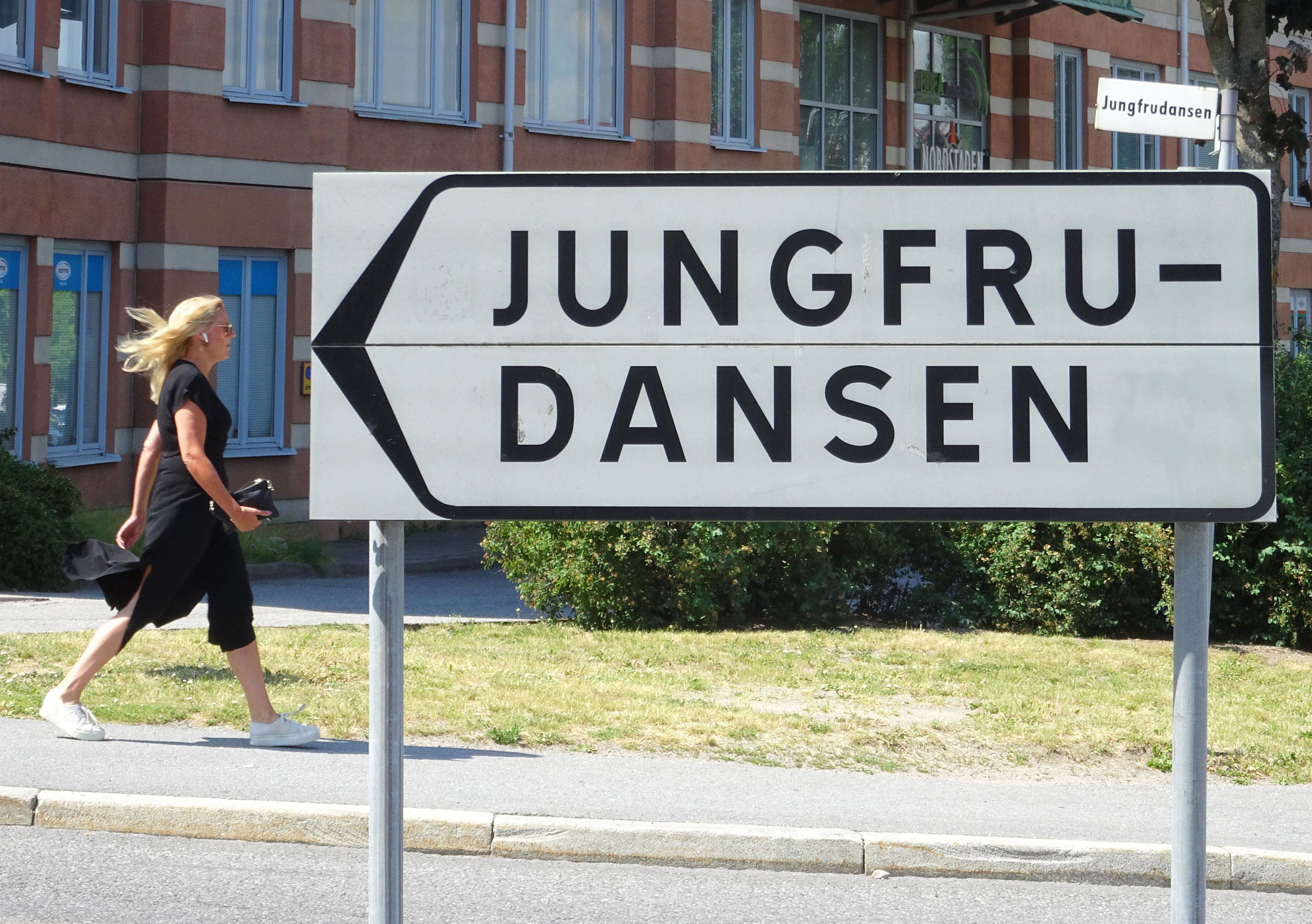 Jungfrudansen skylt i Huvudsta